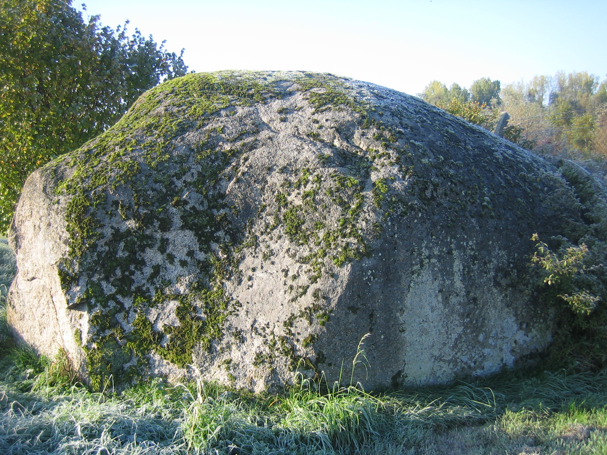 Krappmühlenstein, Findling/Schälchenstein in der Nähe der Krappmühle bei Zirzow, Landkreis Mecklenburgische Seenplatte